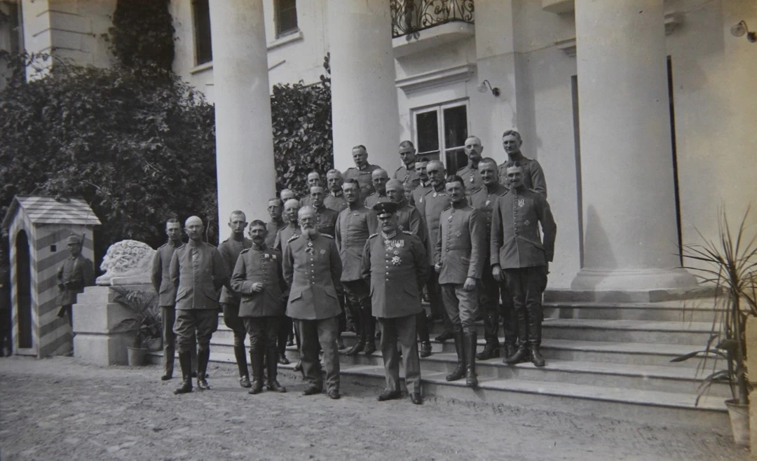 Беларуская (тарашкевіца): Слонім (Słonim), Альбэртын (Albertyn). Палацава-паркавы комплекс Пуслоўскіх (Pusłoŭski)